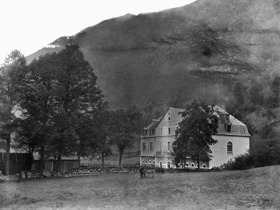 Imatge